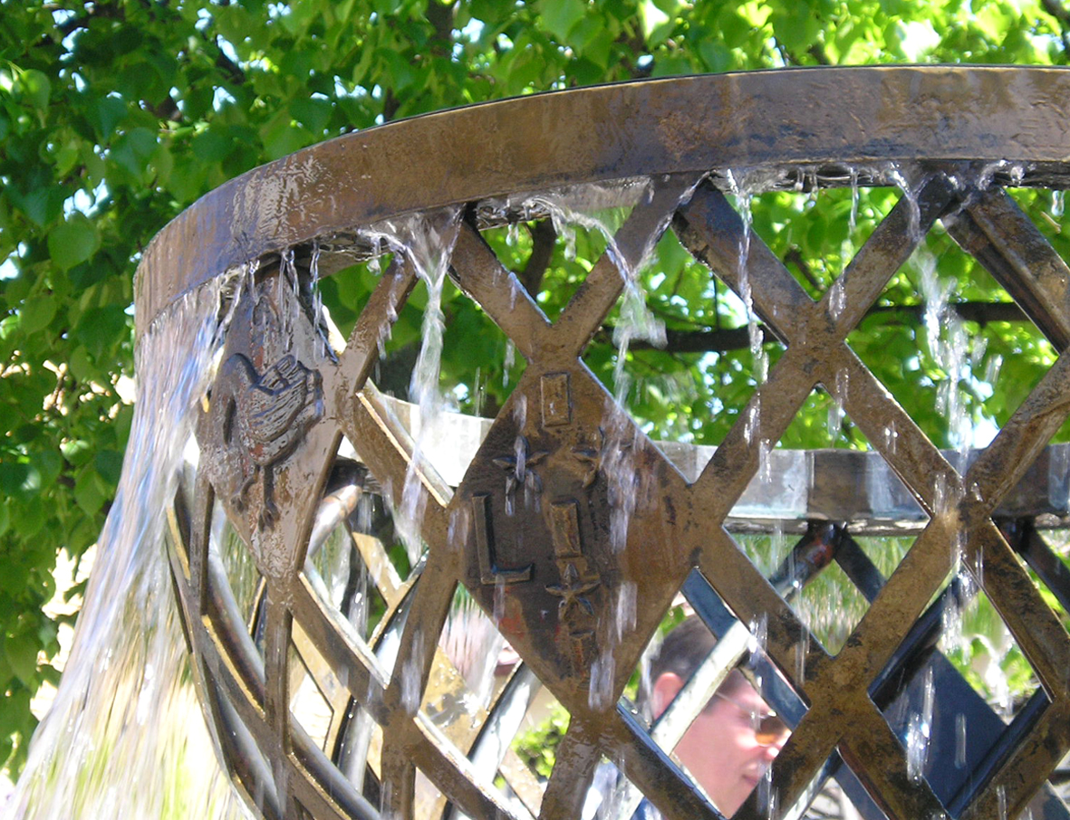 La fontaine de Meckenheim dédiée au jumelage avec Lugny (détail). Inaugurée en 1991, cette fontaine est accompagnée d'une plaque sur laquelle figure l'inscription suivante : « Fontaine dédiée aux maires et fondateurs du jumelage franco-allemand entre Meckenheim (Palatinat) et Lugny (Bourgogne) construite sur la place du village en 1991 à la mémoire d'une Europe unie et pacifique. »